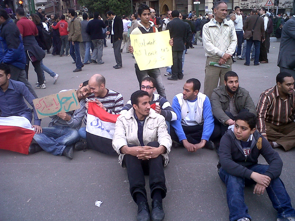 IMG00598-20110130-1630